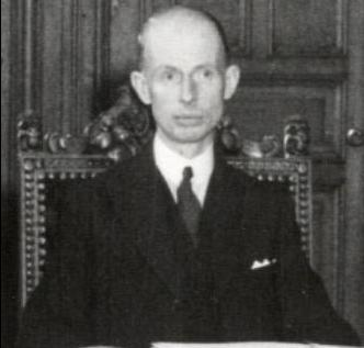 Eelco van Kleffens (1894-1983), Nederlands politicus